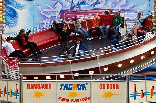 Basler Herbstmesse 2005: Tagada Show (Kasernenareal)